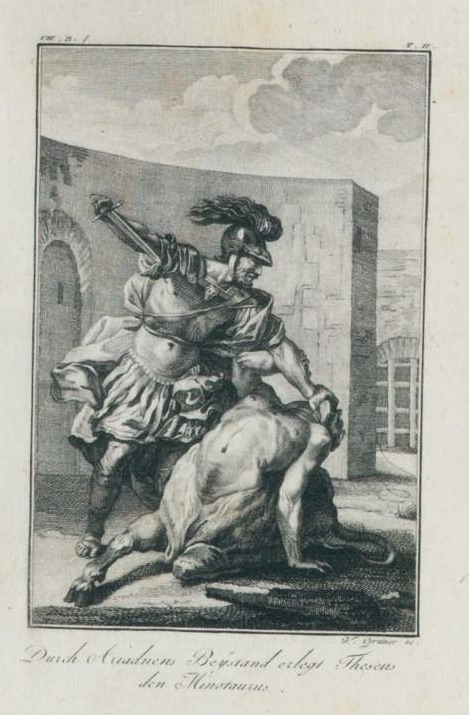 Zu Ovids Verwandlungen. Bd. 2, Wien 1791, vor S. 179 "Theseus tötet den Minotaurus".